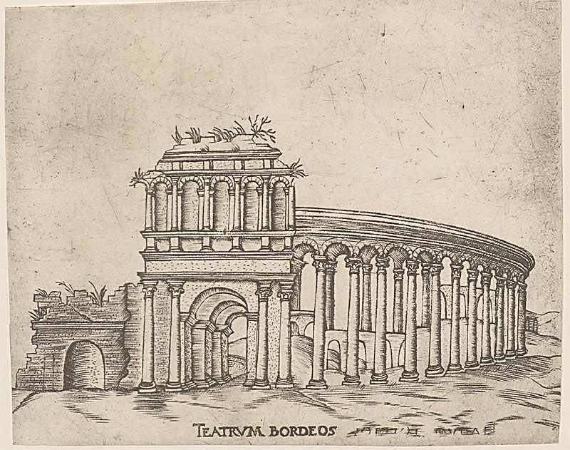 Teatrum Bordeos (antikes Theater von Bordeaux); Kupferstich, um 1560